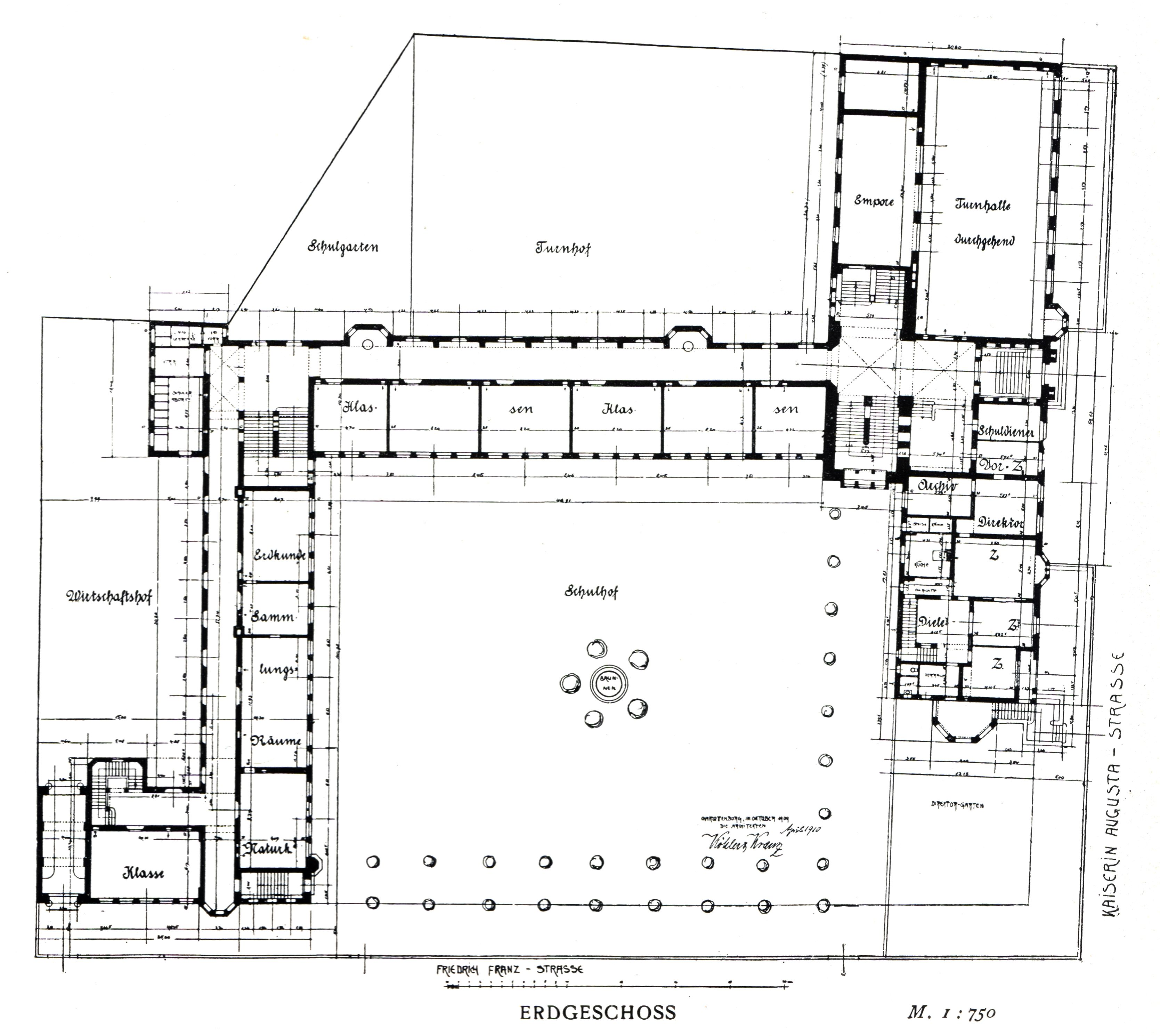 Berlin - Tempelhofer Reformgymnasium, Grundriss